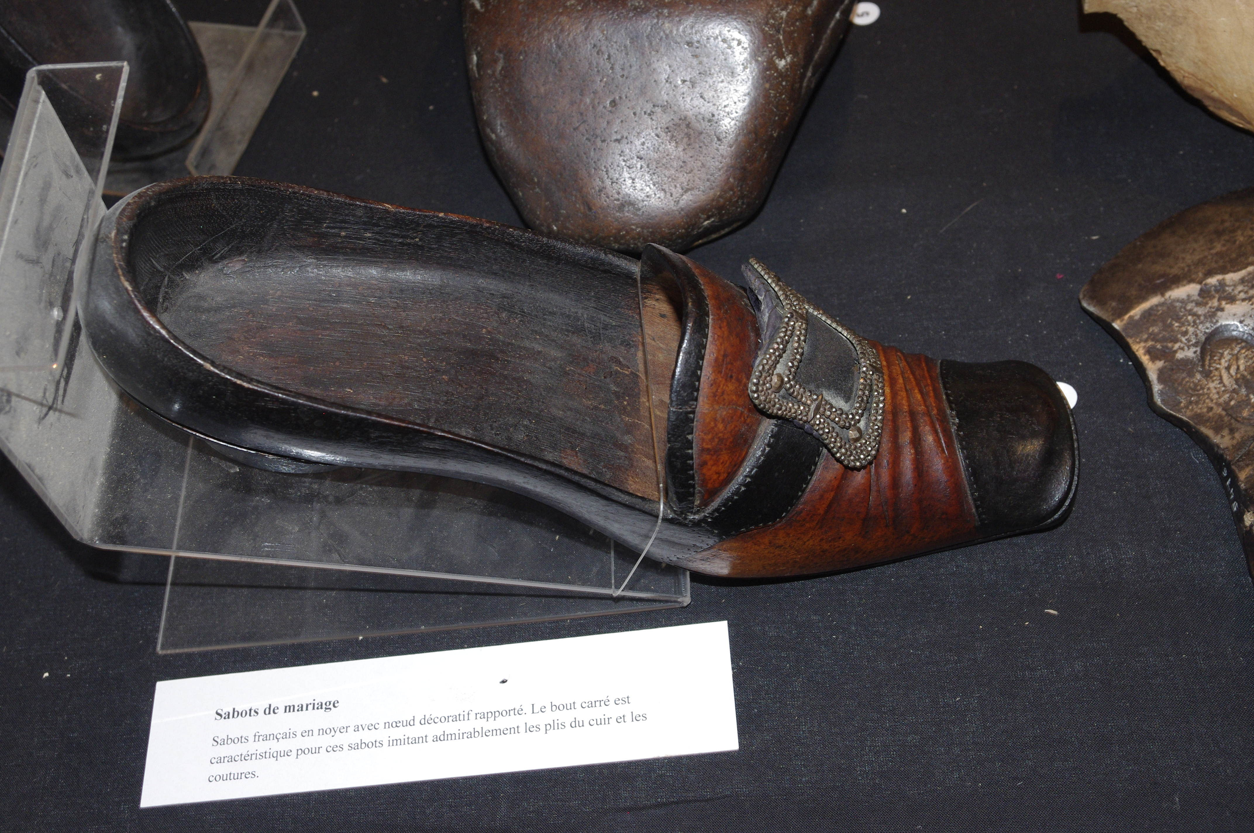 Musée du bois dans l'arboretum d'Aubonne, Suisse. Des sabots de mariage français en noyer.